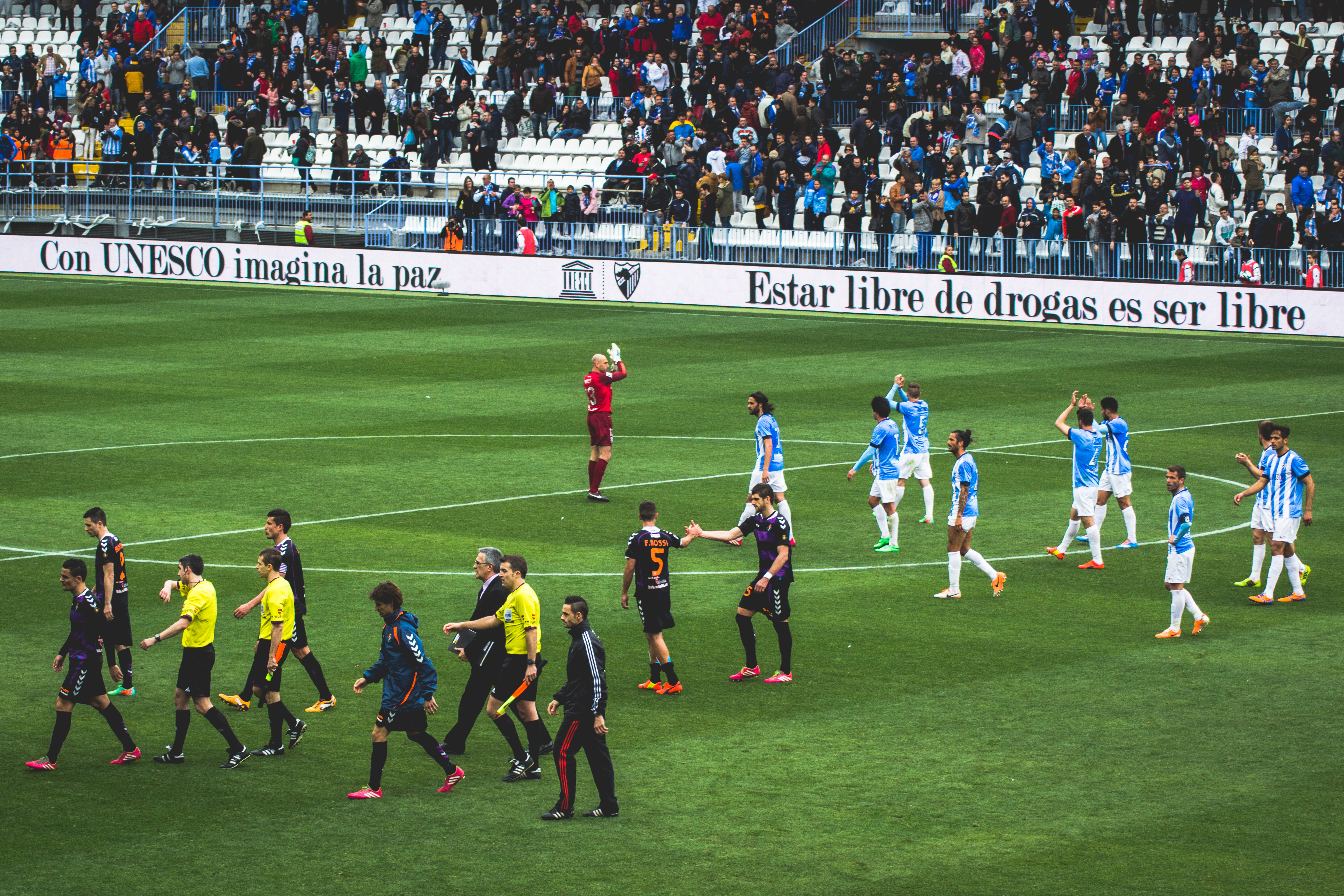 Málaga CF 2013/14, España.